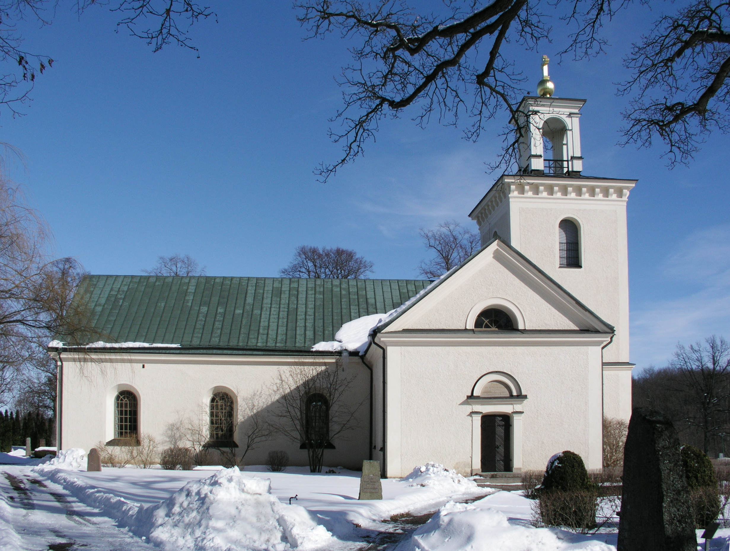 Kärna kyrka, Malmslätt. Diocese of Linköping. Sweden.